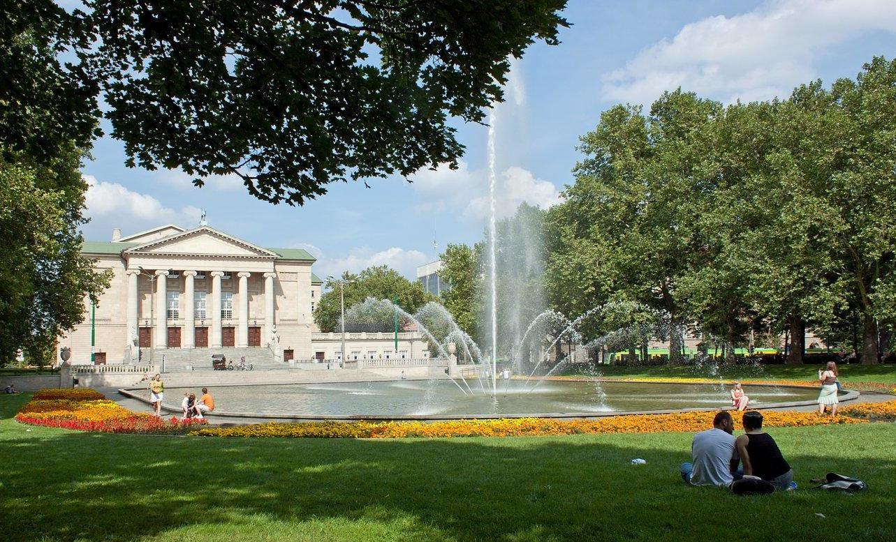 Park Adama Mickiewicza w Poznaniu założony na początku XX wieku na terenie dawnych fortyfikacji. W tle Teatr Wielki.